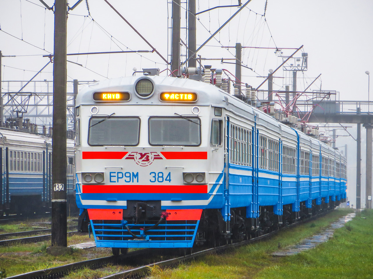 Построен в десятивагонной составности. С завода поступил в моторвагонное депо Фастов (Юго-Западной ж. д.) КРП (КР-2) Киевский ЭВРЗ 10.2017 г. Прим.: Оборудован светодиодными маршрутными указателями (как в ЭР9Т-668), добавлены светодиодные указатели вагона